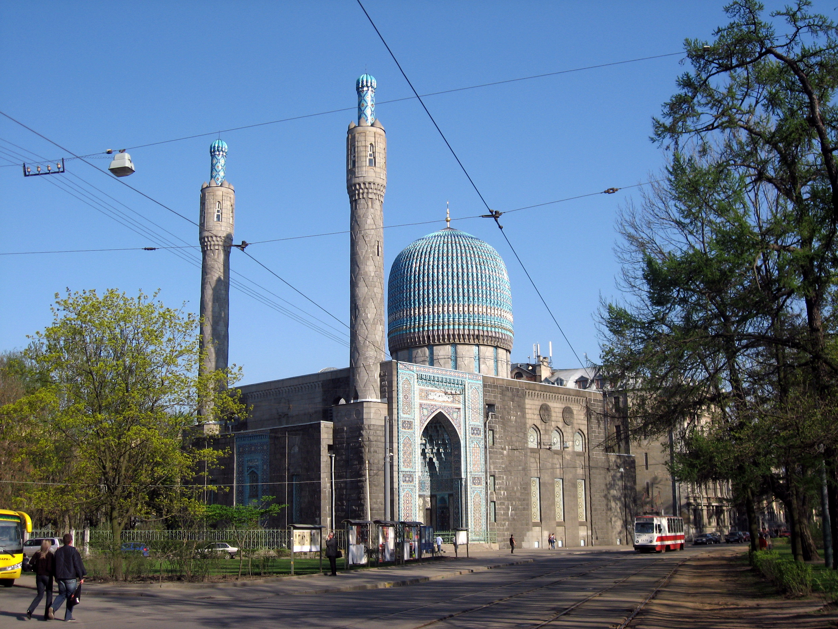 Sankt-Petěrburg, mešita